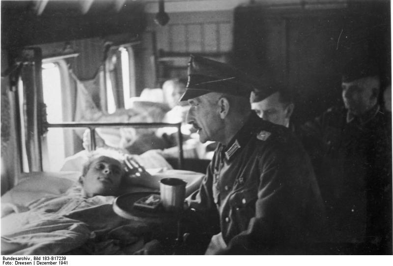 Ein Lazarettzug rollt westwärts. Kein Tag vergeht, an dem nicht der Oberstabsarzt mehrere Male am Bett seiner ihm anvertrauten Verwundeten sitzt und persönlich den Fortgang des ersten Heilungsprozesses überwacht. [Strecke Smolensk - Warschau] PK - Aufnahme: Kriegsberichter: Dreesen (sch.) 1099 - 42 "Fr." "Fr. OKW" Dezember 41 B 17239